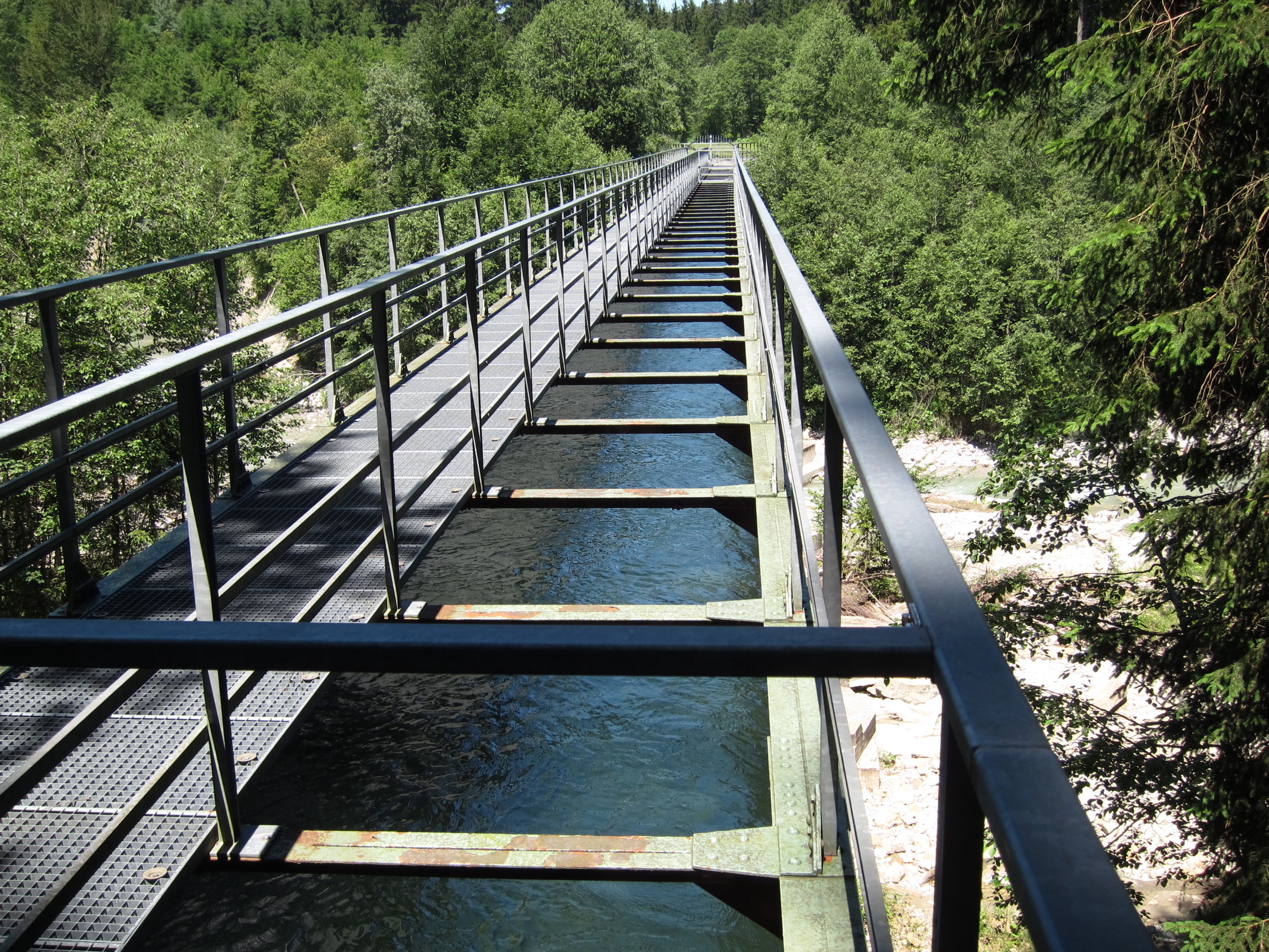 Wasserkraftwerk Kammerl, Aquädukt über die Halbammer (kein Zutritt)